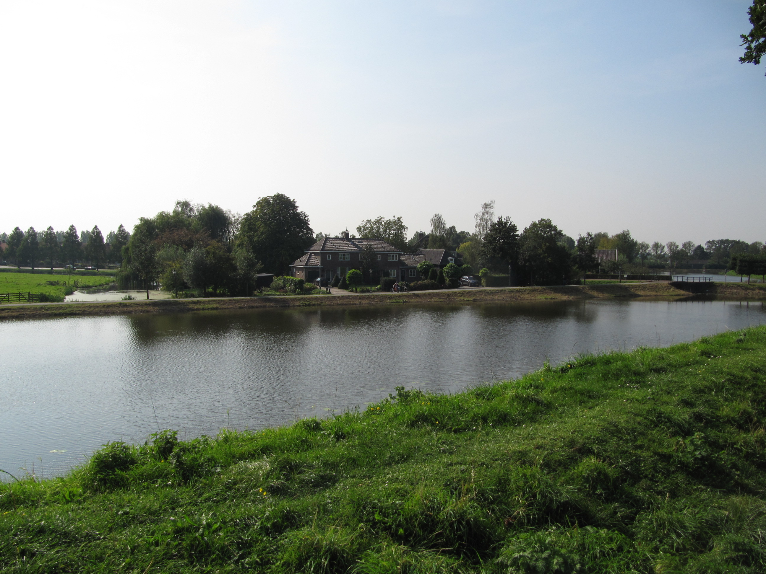 RM344430 Nieuwpoort - Oude Vest.jpg